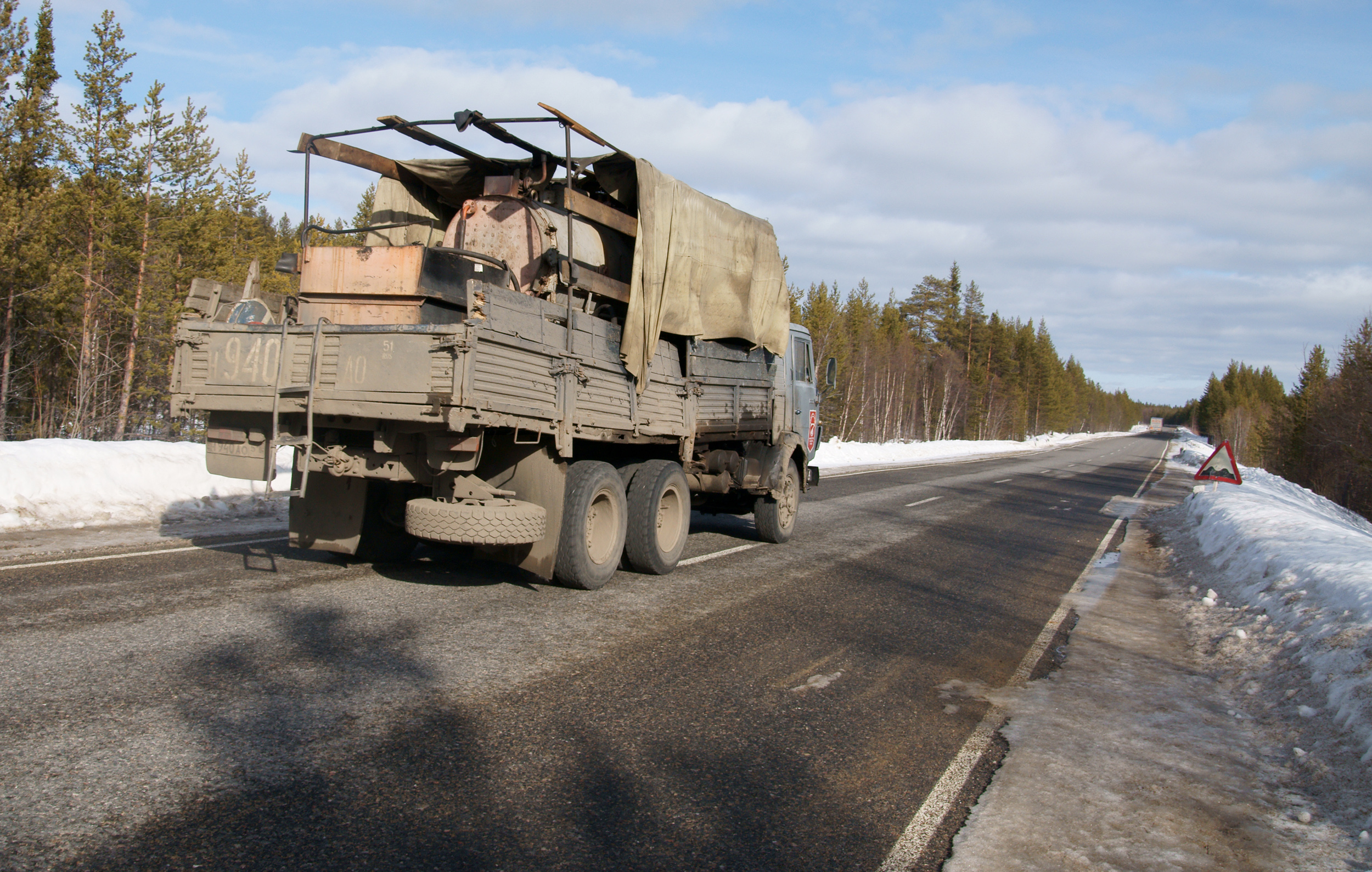 Kuva noin 50 kilometrin päästä Venäjän rajalta Venäjän puolella, Raja-Joosepin raja-aseman kohdalta.